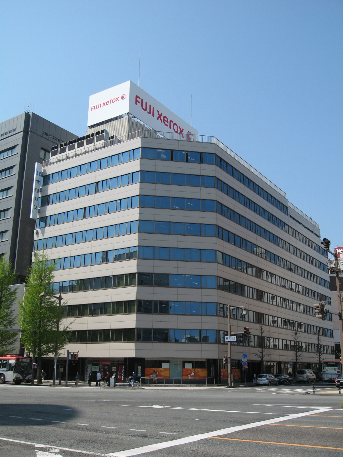 新潟県新潟市中央区。美術館などが入居する、北陸ビルの画像。